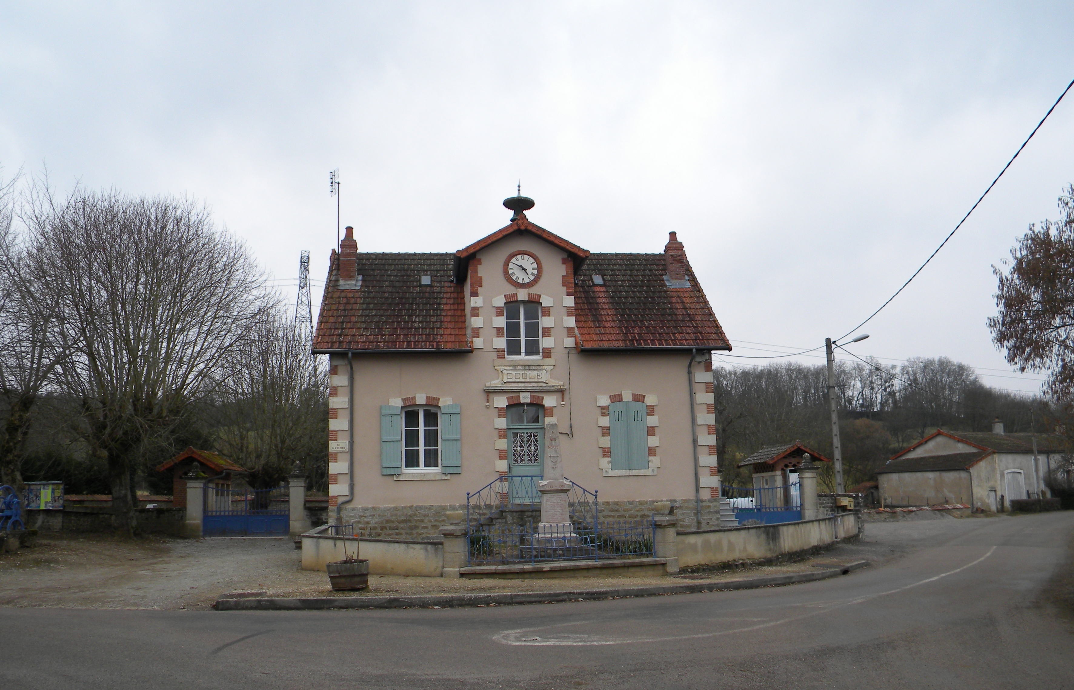 Mairie de Épertully